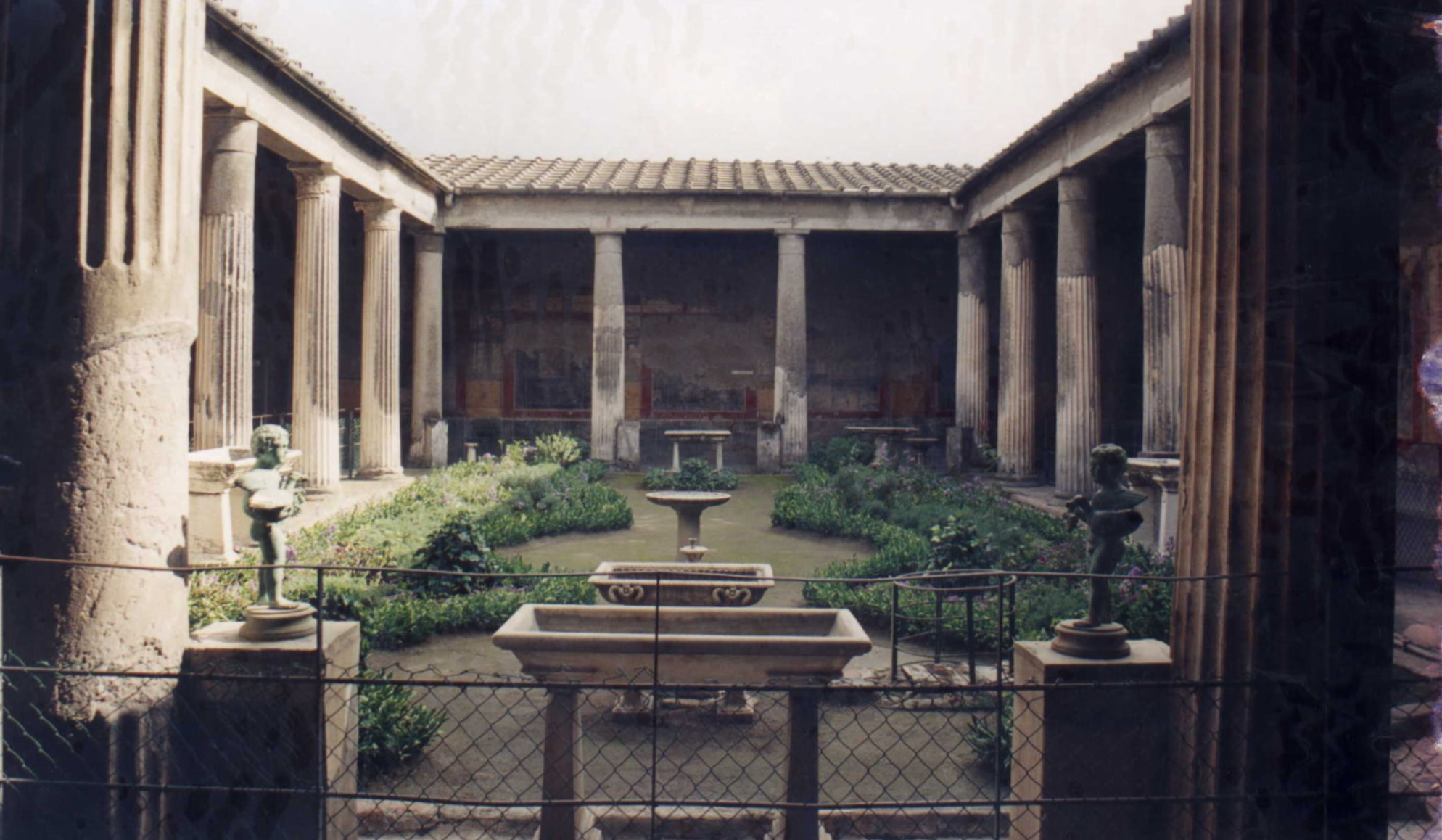 Casa de los Vettii, Pompeya, Italia